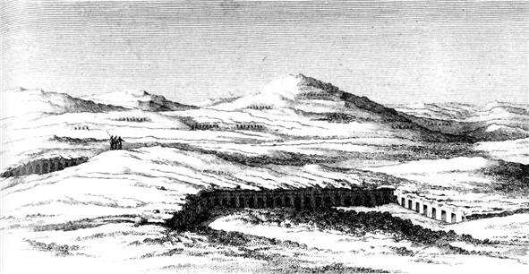 Zeichnung von Vivant Denon in Voyage, nach Clayton wiederentdeckte Ägypten